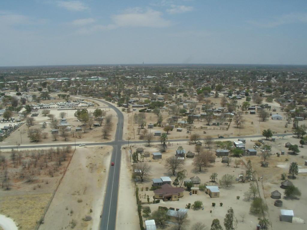 Maun, Botswana aus der Luft